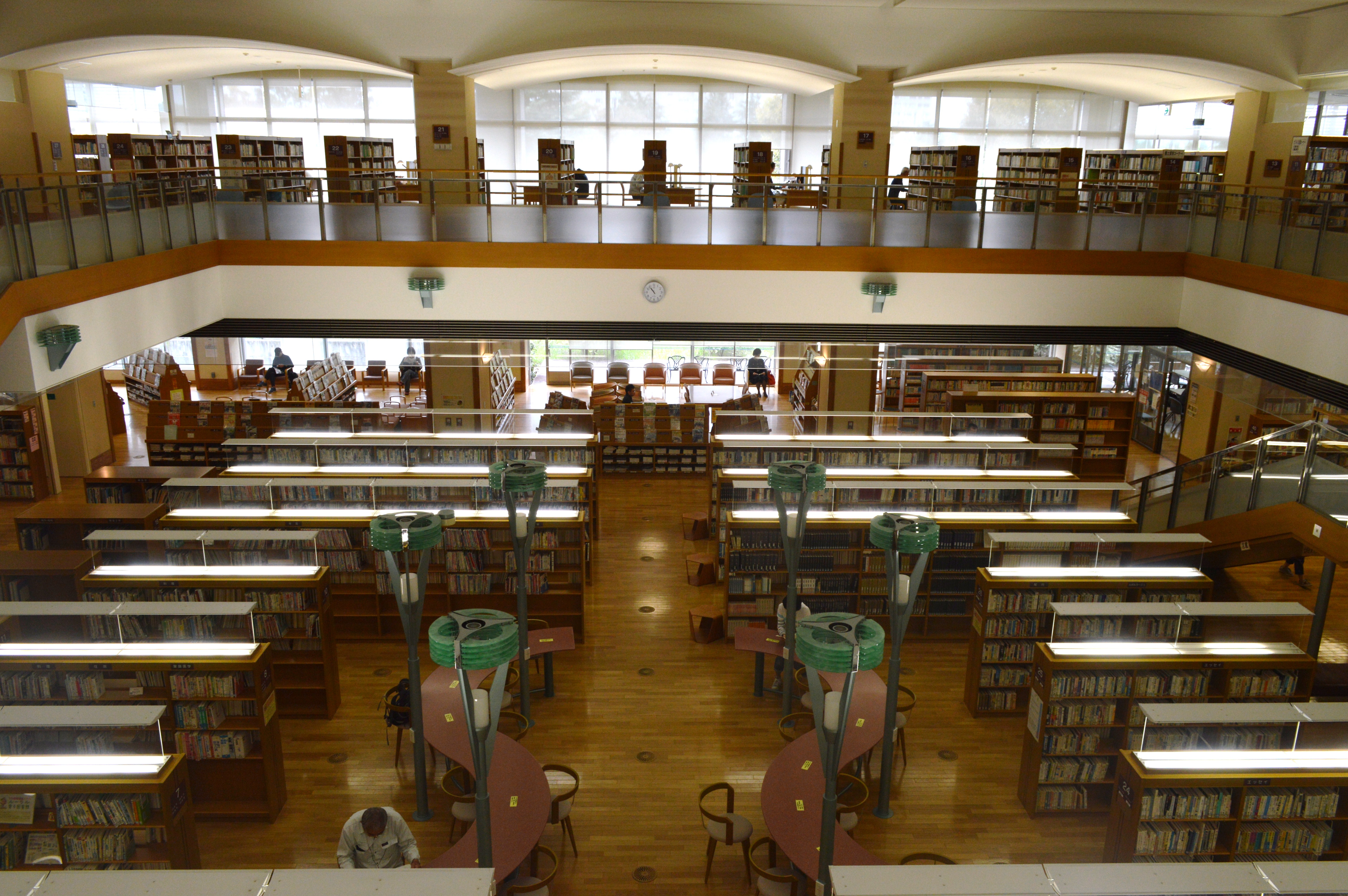 浜松市立城北図書館。2階から1階を見下ろす。